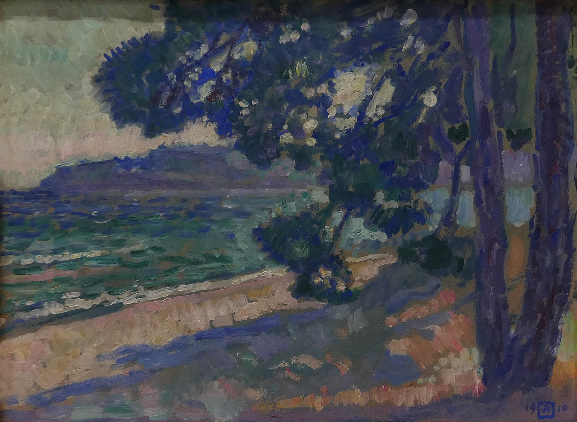 Théo van Rysselberghe, Plage de Cavalaire, 1910 Musée de Grenoble. Legs Agutte-Sembat,1923.